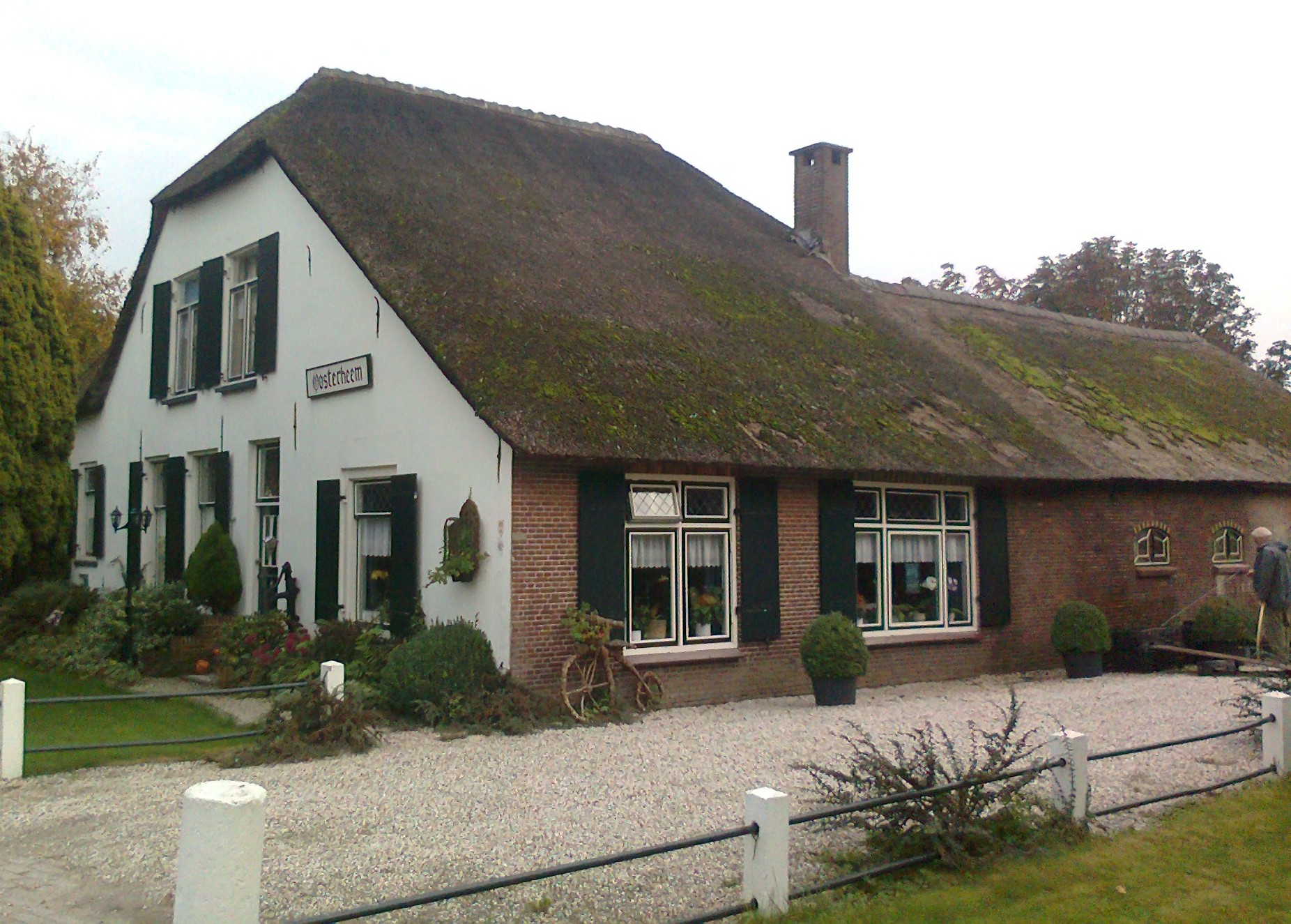 Rijksmonument 20811, Breudijk 22, Harmelen, Nederland